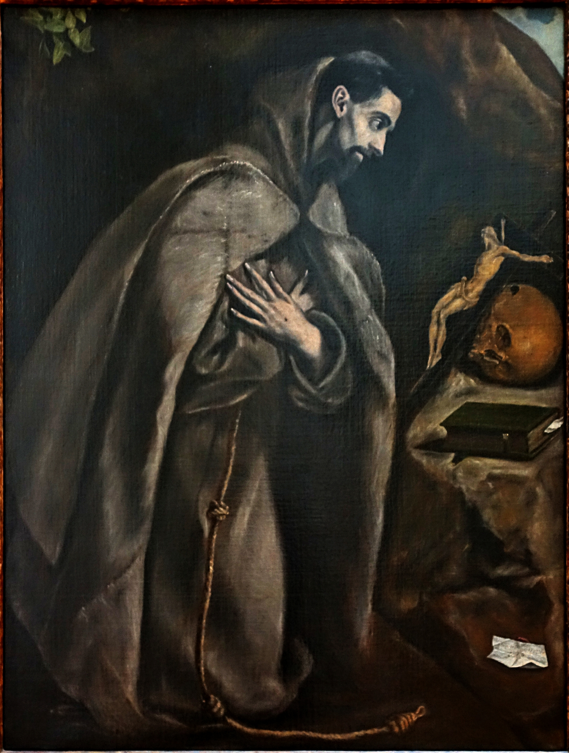 Saint François en prière au Palais des beaux-arts de Lille.